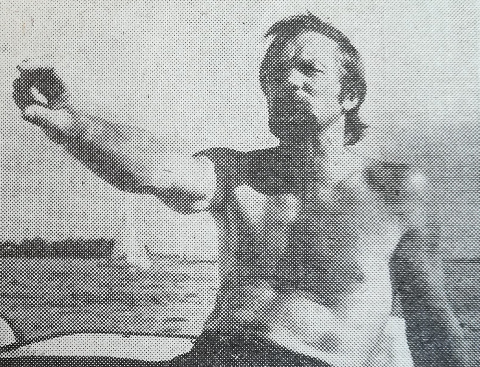 Andrzej Zawieja (pseud. Andy, ur. 1940) – polski żeglarz, olimpijczyk, trener.